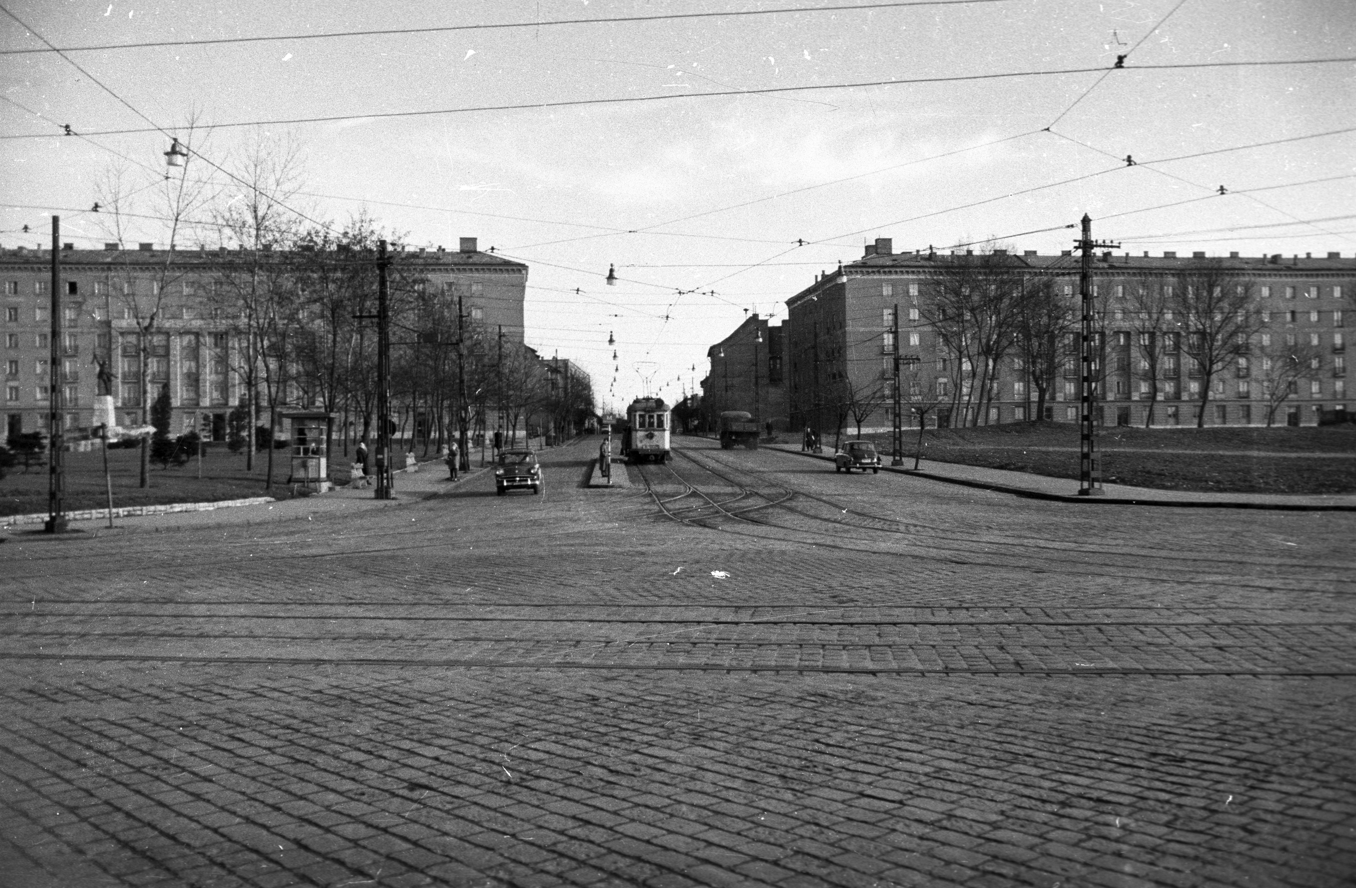 Váci út, szemben az Árpád út. Location: Hungary, Budapest IV. Tags: tram, Budapest Title: Váci út, szemben az Árpád út.